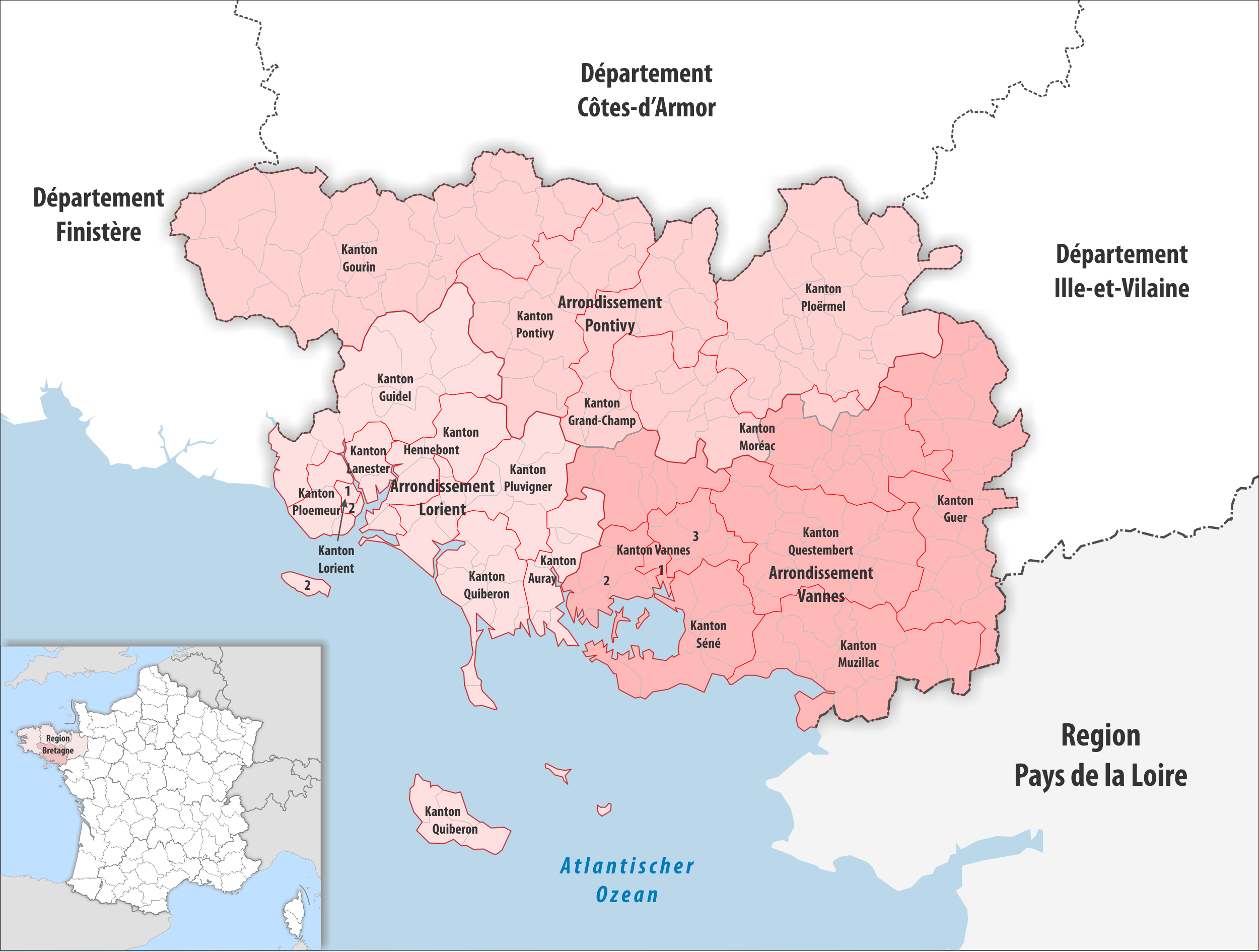 Gemeinden, Kantone und Arrondissemente im Departement Morbihan